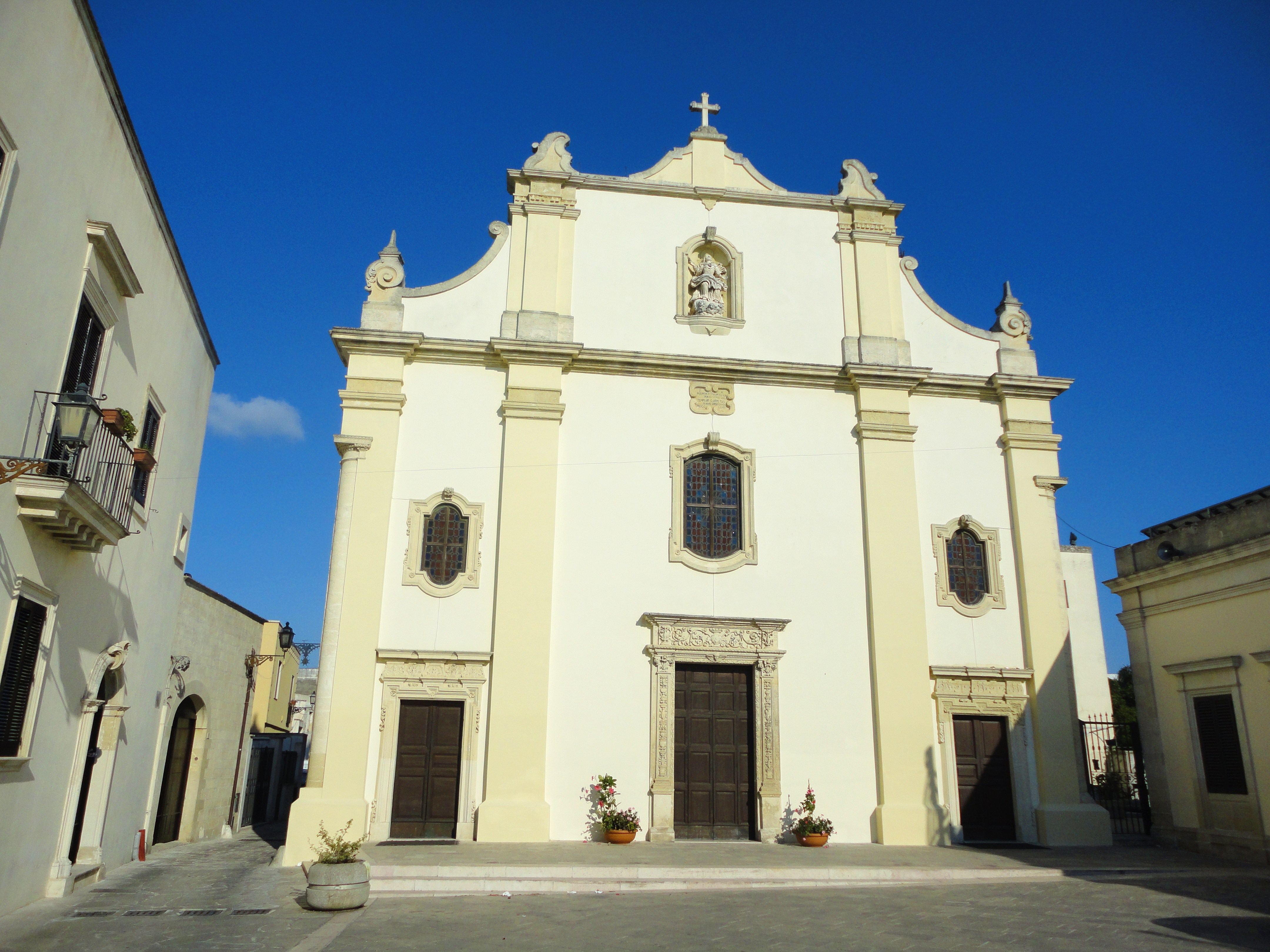 Chiesa Madre di Melendugno, Lecce